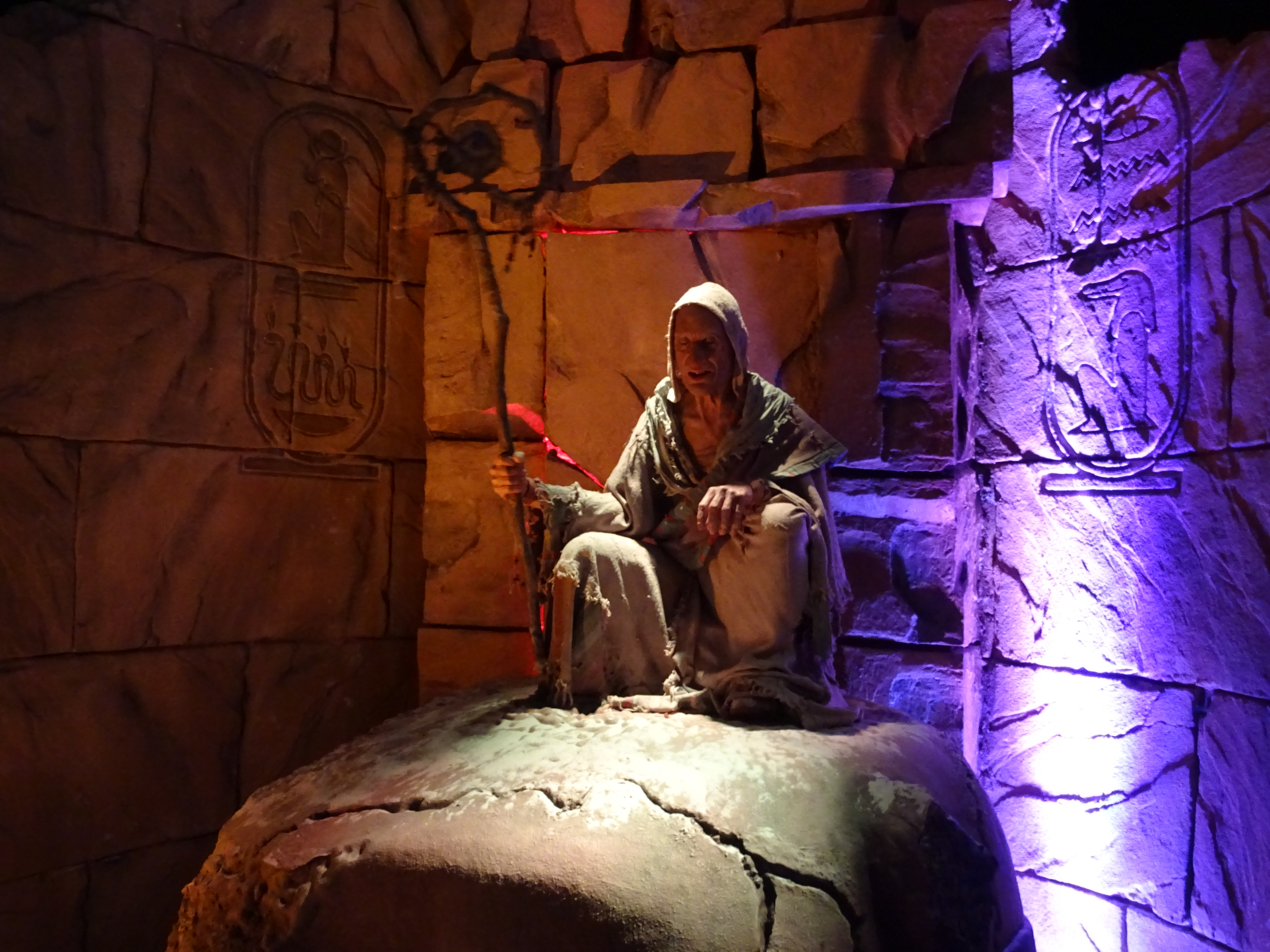 Animatronic de Challenge of Tutankhamon à Walibi Belgium